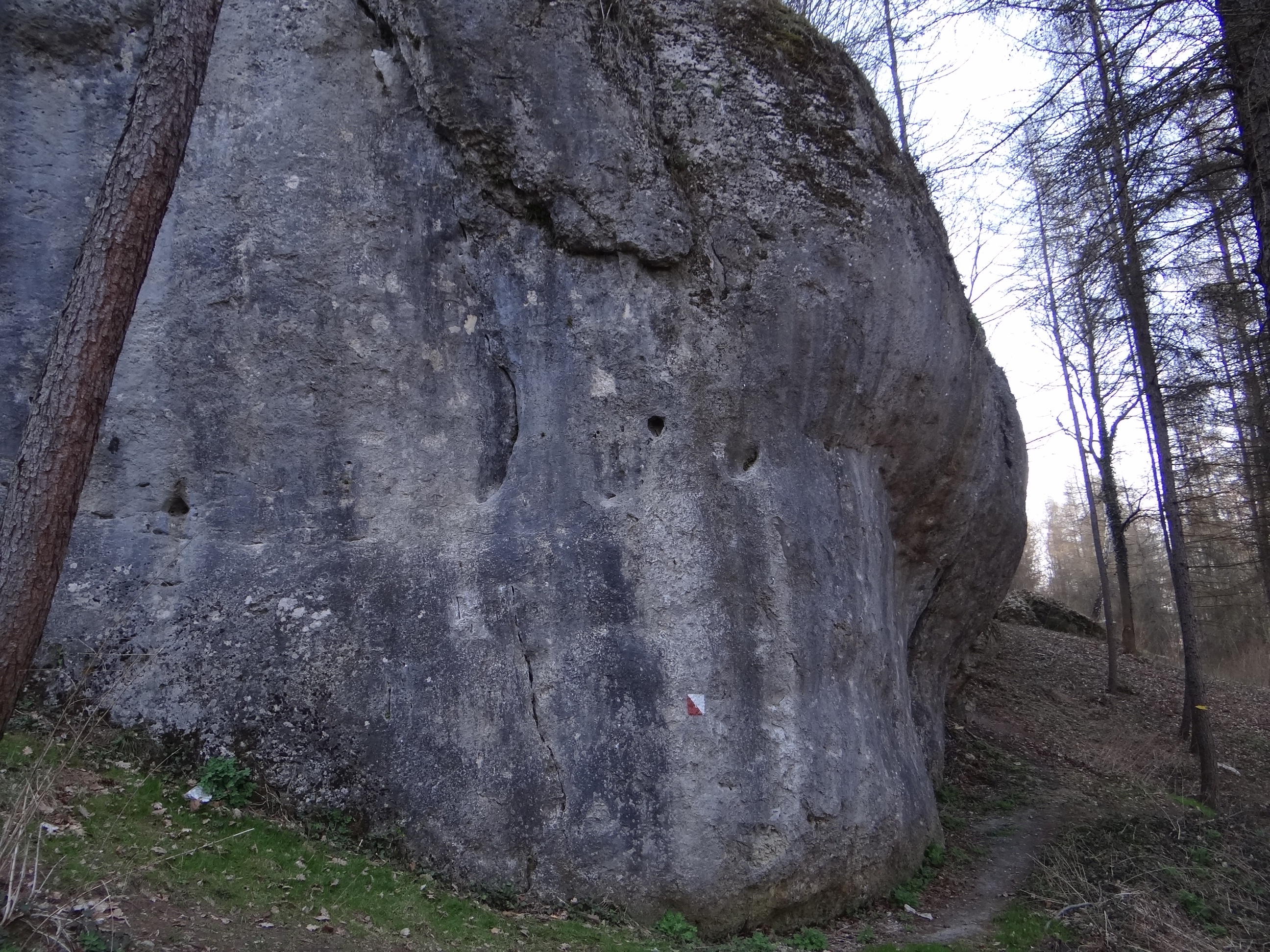 Skała Obchodnia w Dolinie Brzoskwinki